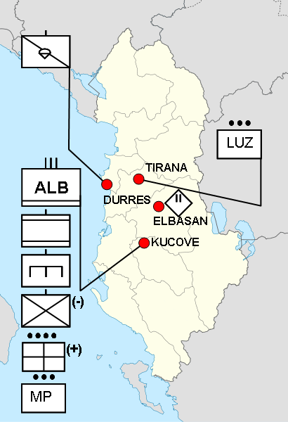 Dislocierung des UstgVbd ALB